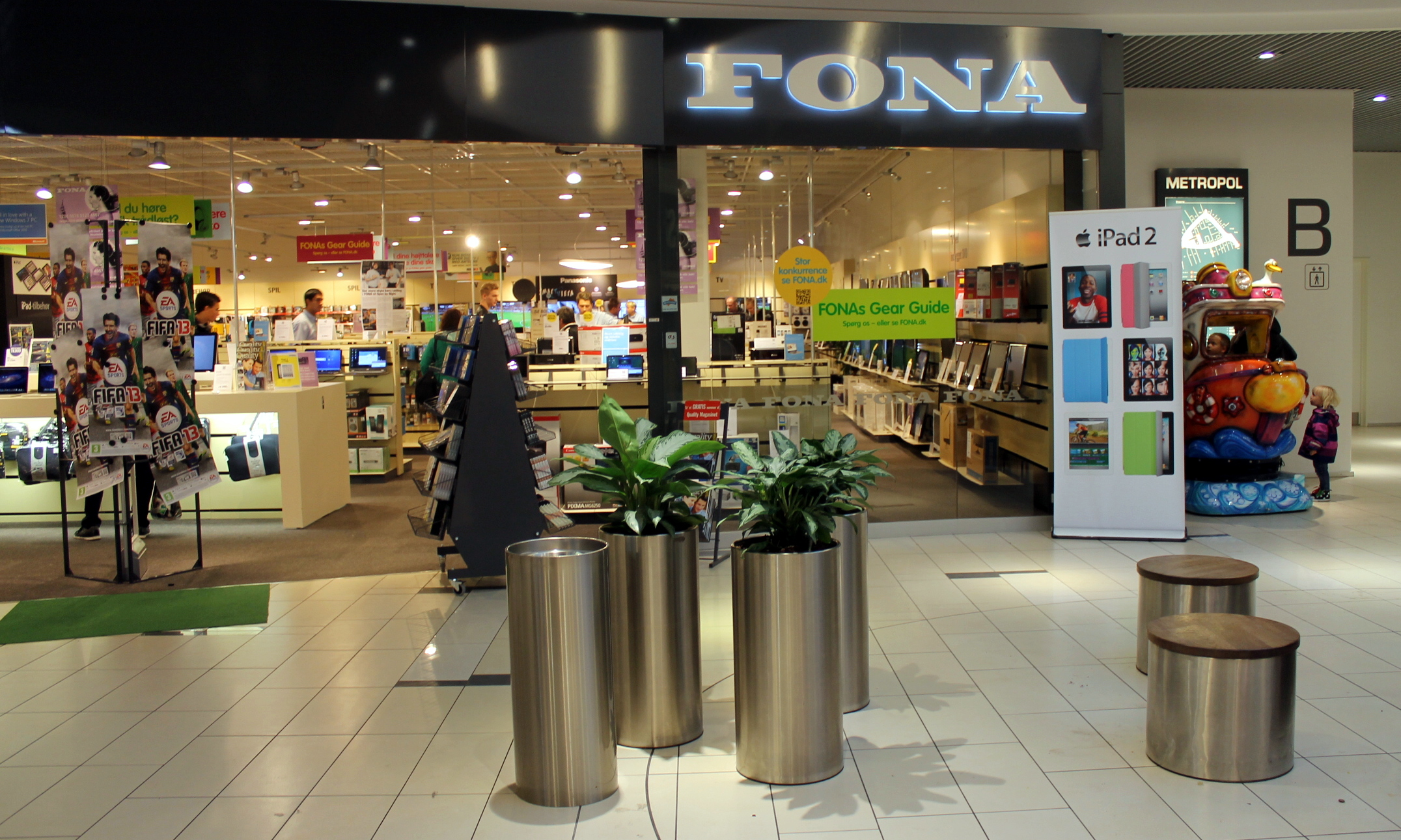 FONA-butikken i Hjørring